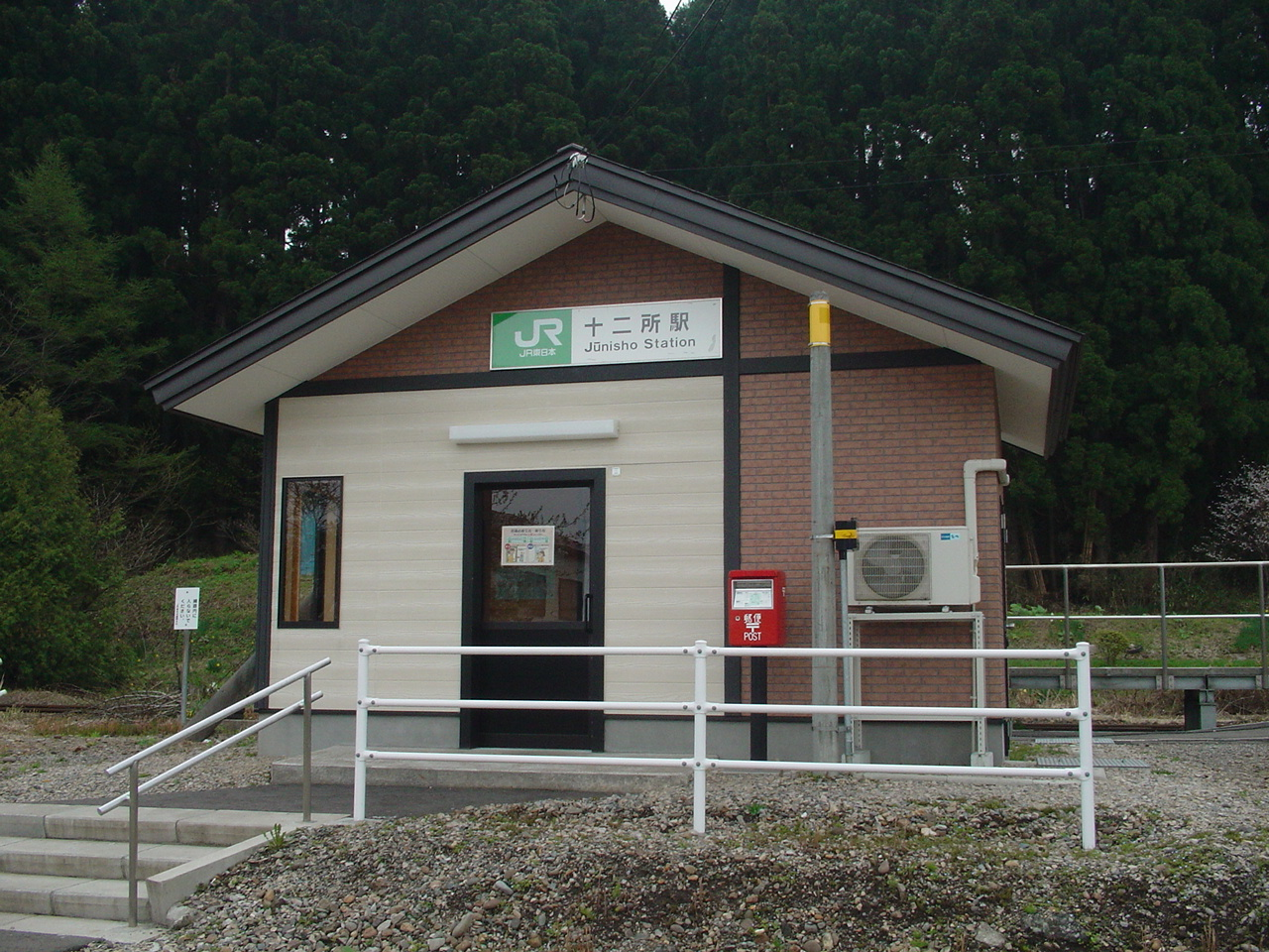 （十二所駅）